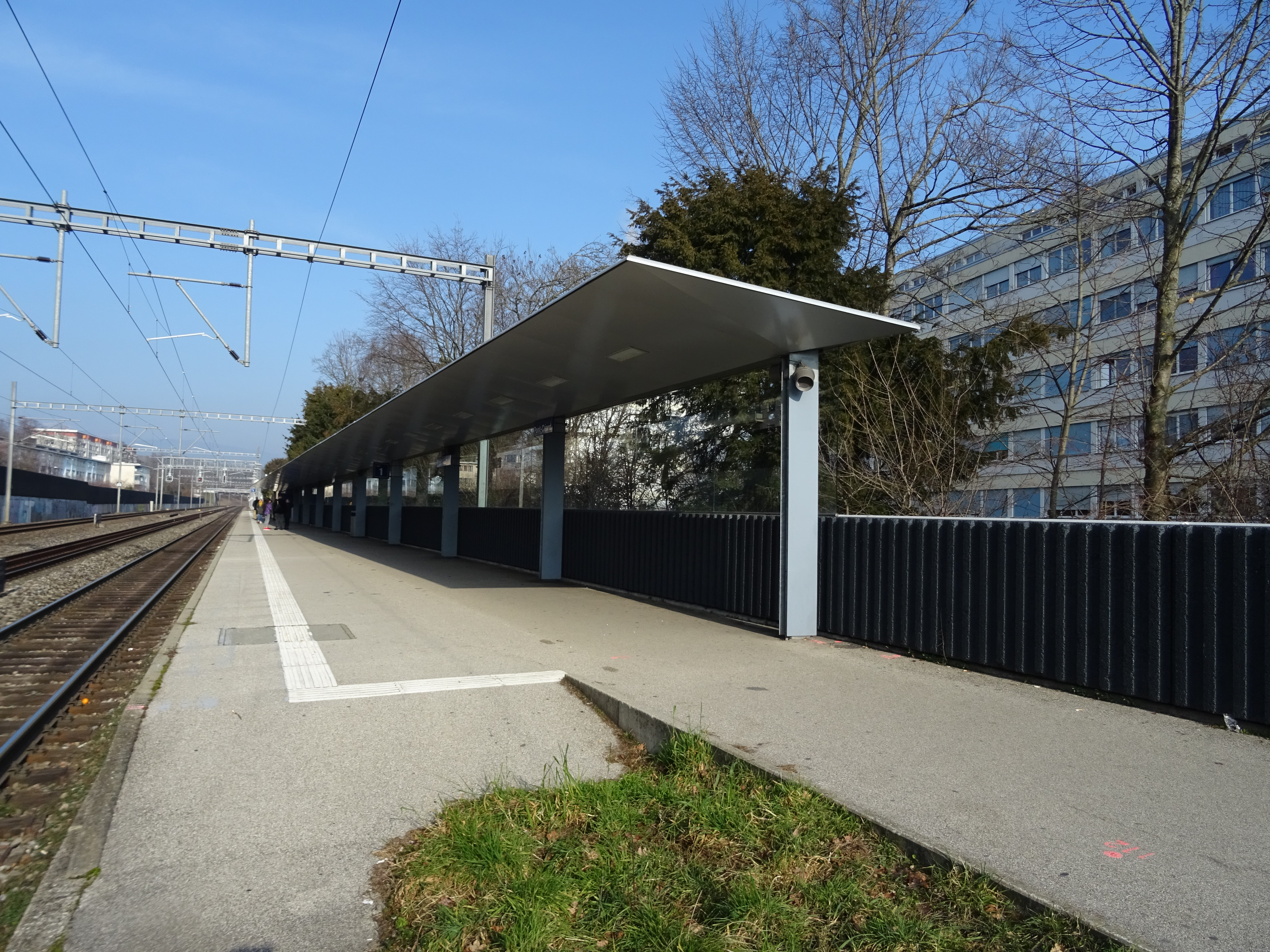 Vue d'ensemble du quai de la gare de Pont-Céard.